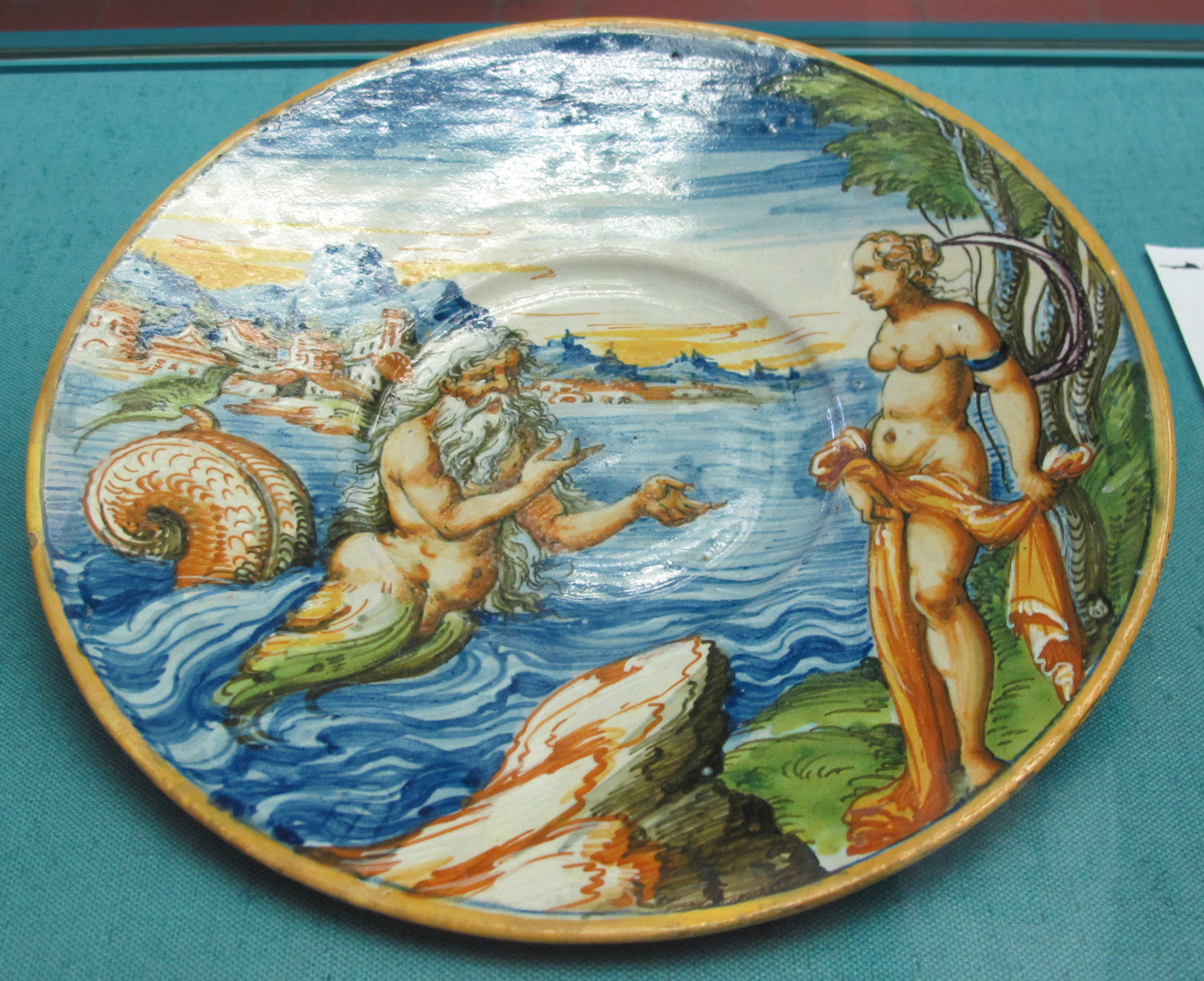 Urbino, piatto con glauco e scilla, da ovidio, 1570 ca